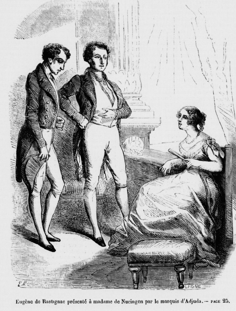 Eugène de Rastignac présenté à madame de Nucingen, roman : Le Père Goriot, de Balzac